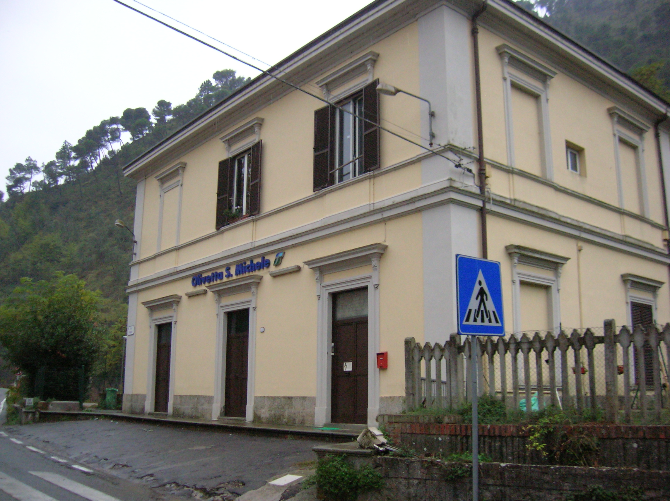 Olivetta San Michele, Liguria, Italia.